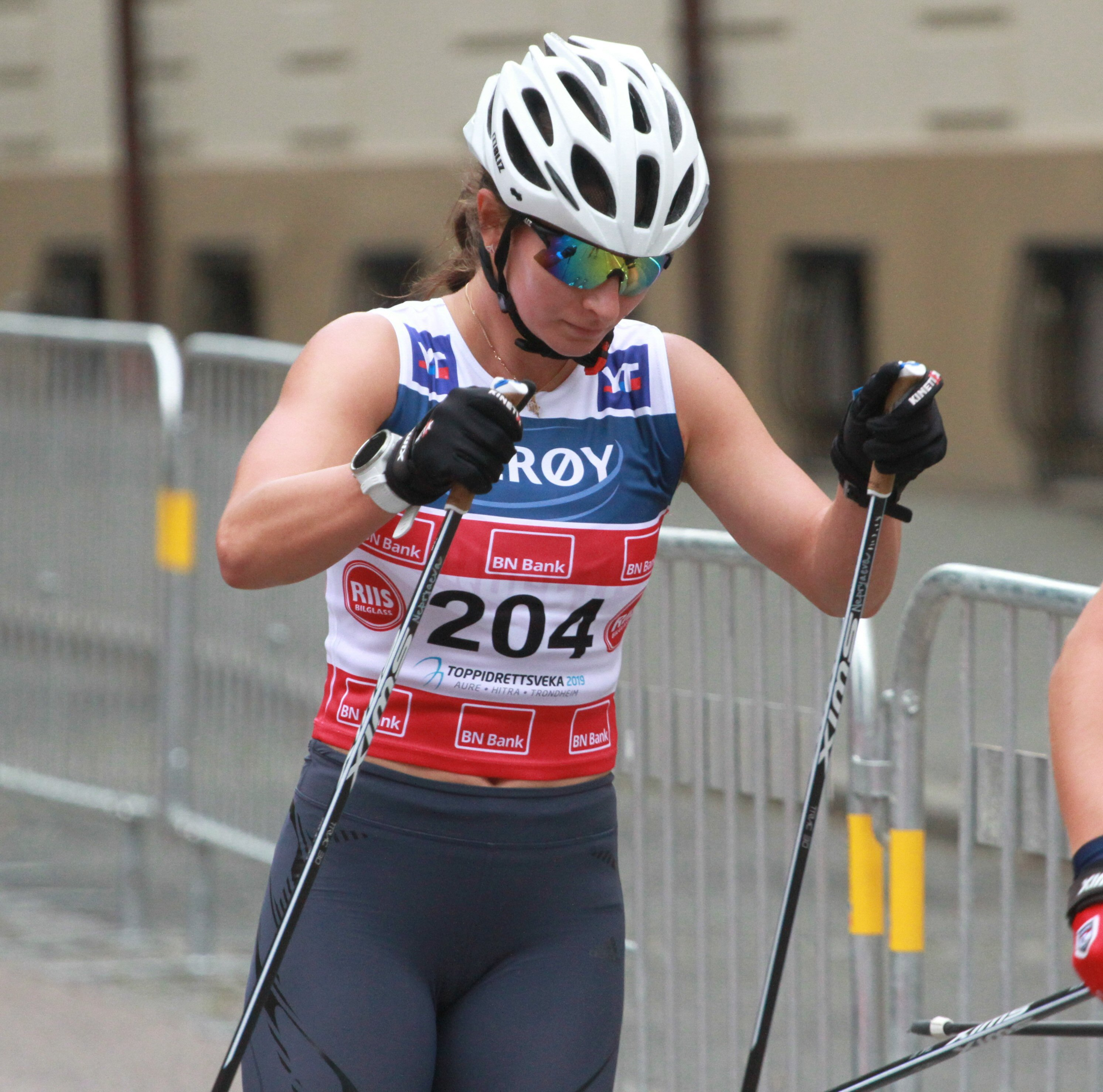 Toppidrettsveka 2019 i Trondheim - Natalia Nepryaeva